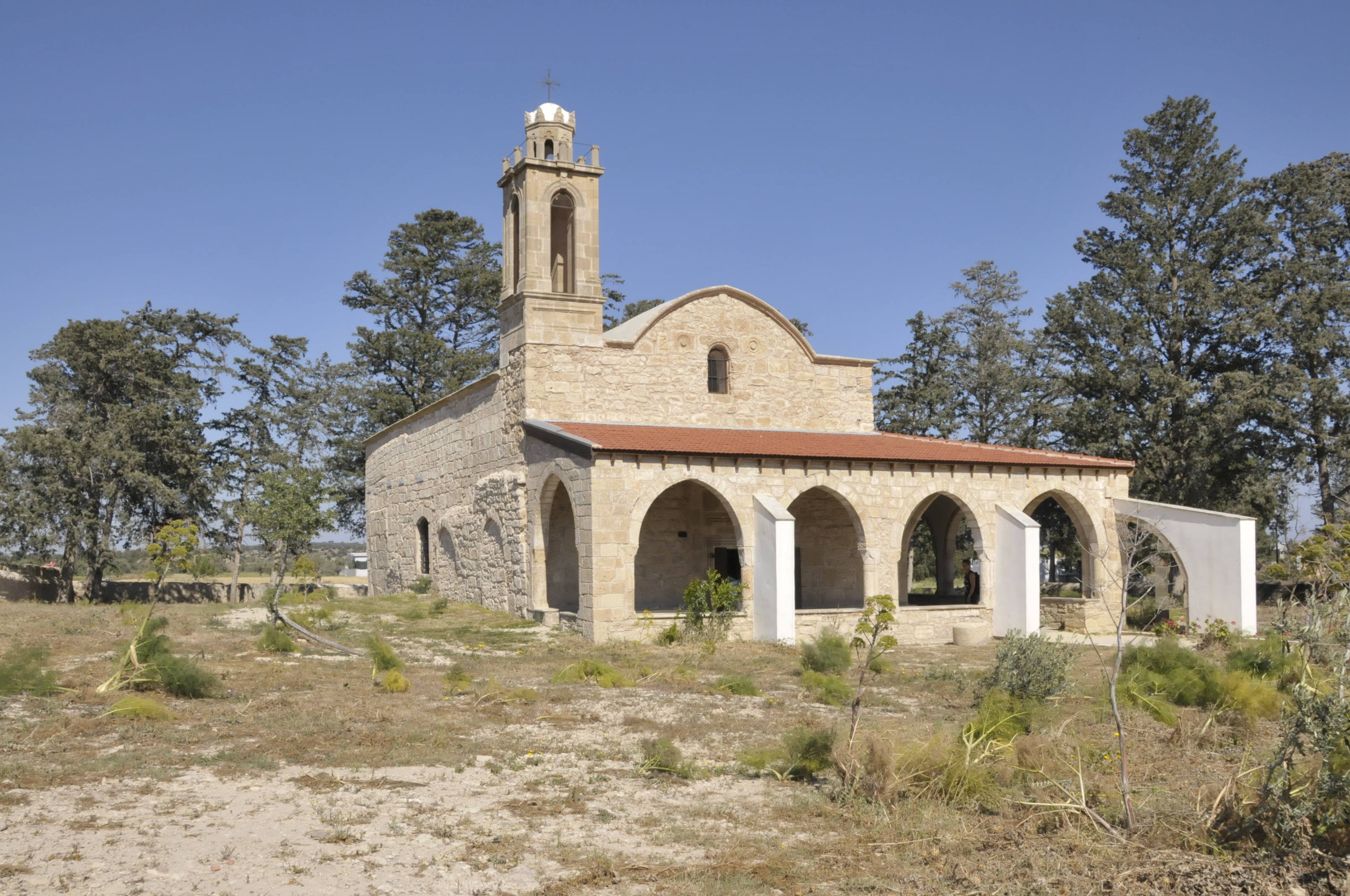 Büyükkonuk: Kirche Agios Efksentios